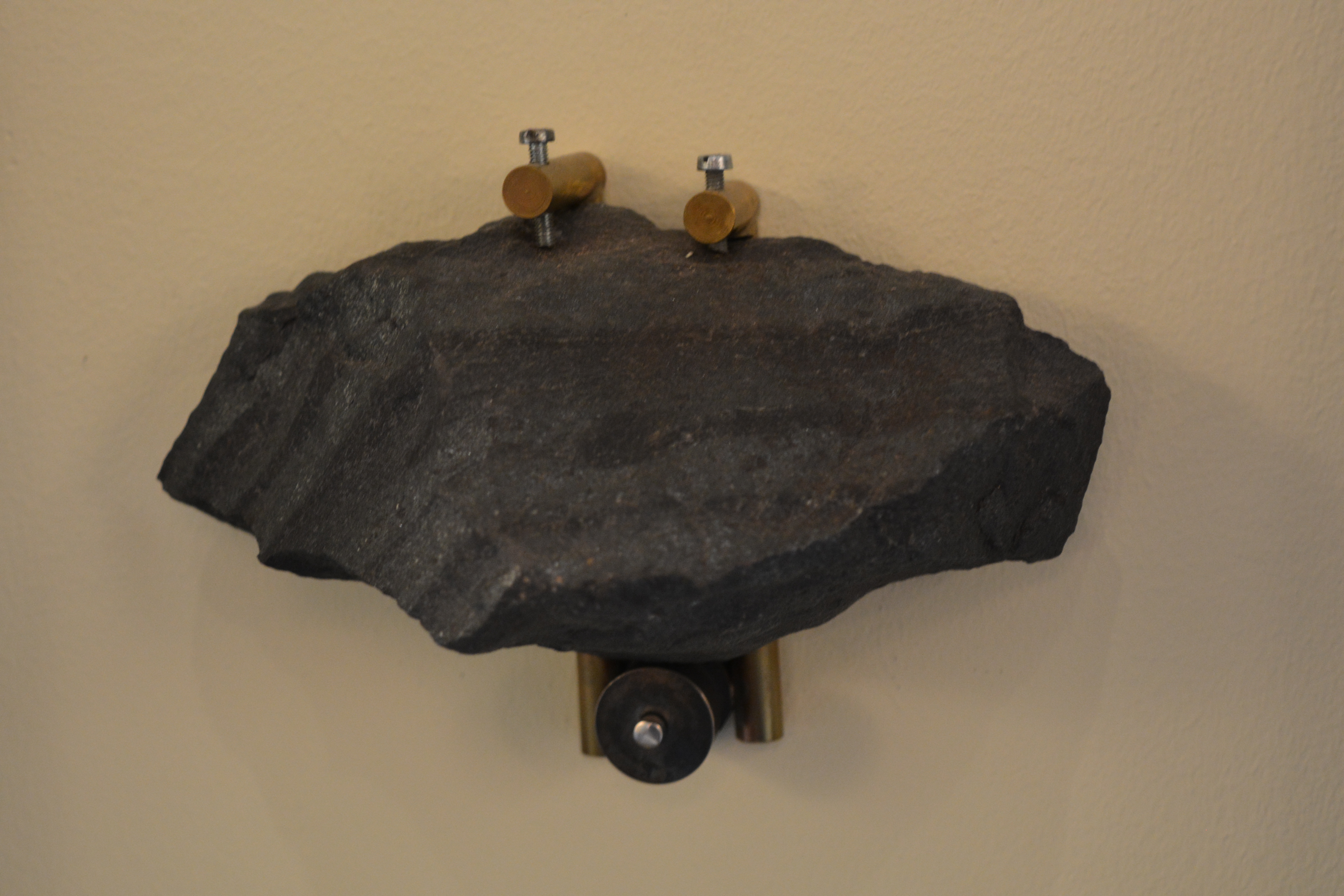 Stripa: randig blodstensmalm